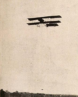 El Sanchez-Besa volando sobre Reims, piloteado por su constructor.